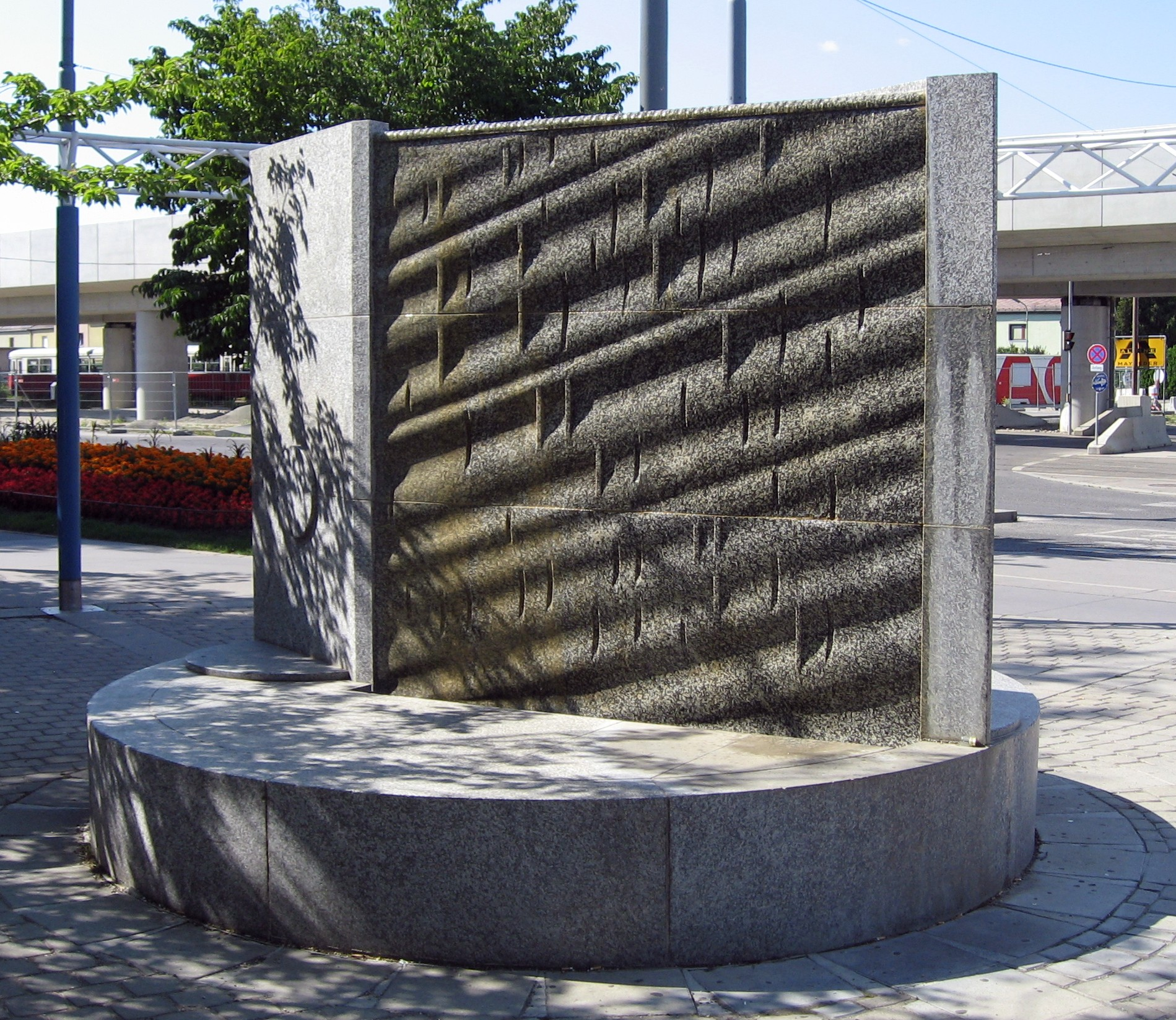 Brunnen "Nasser Stein" vor dem SMZ Ost in Wien-Donaustadt